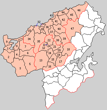 京都府中郡・竹野郡・熊野郡の町村制時点の町村。